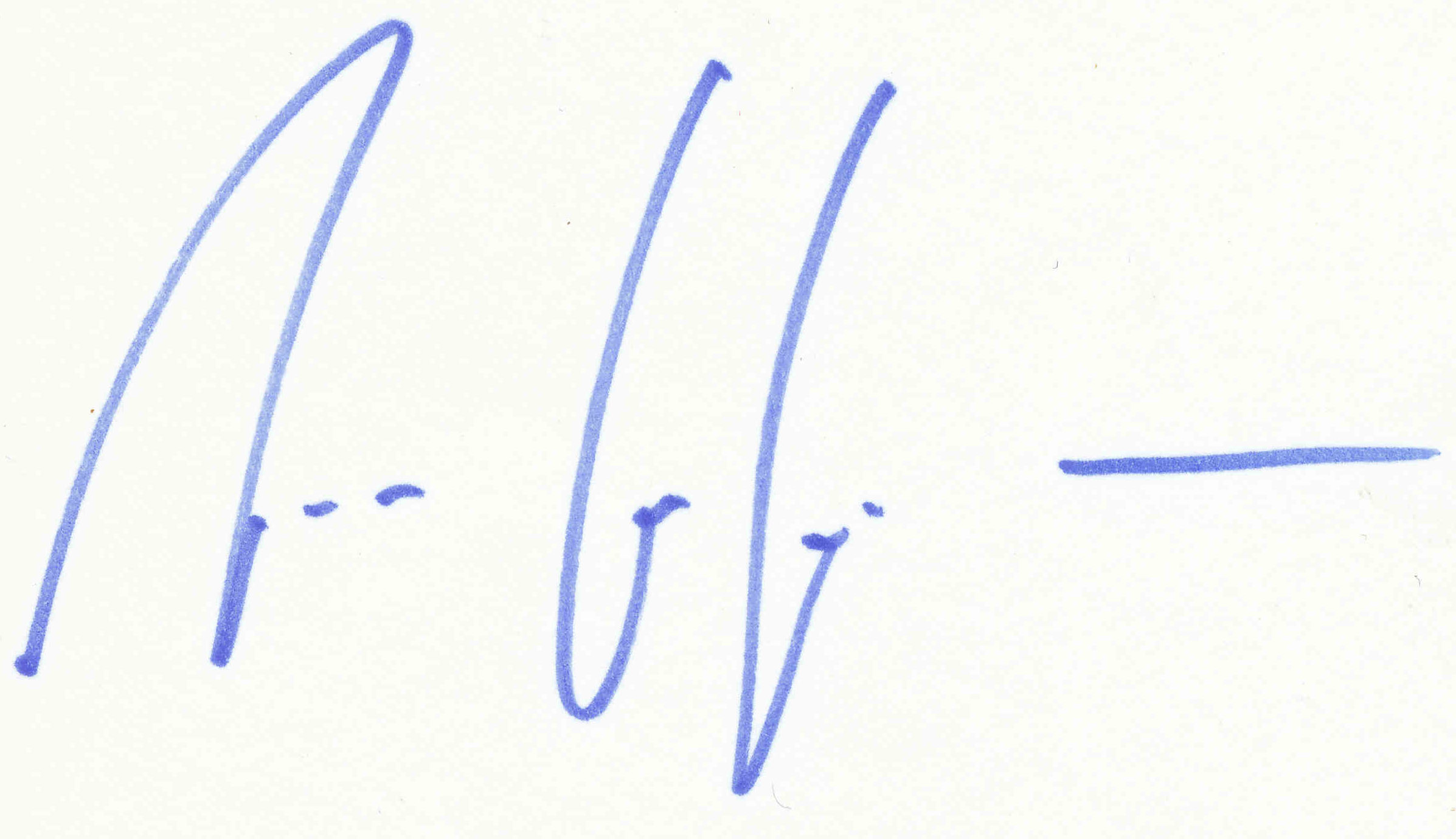 Signatur von Andreas Kaufmann